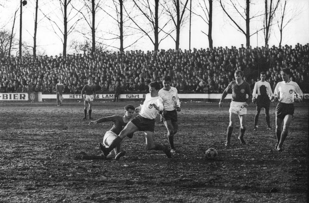 im Holsteinstadion.Im Bild u.a. Holsteins Manfred Podlich (3.v.r.) und Otto Hartz (2.v.l.).